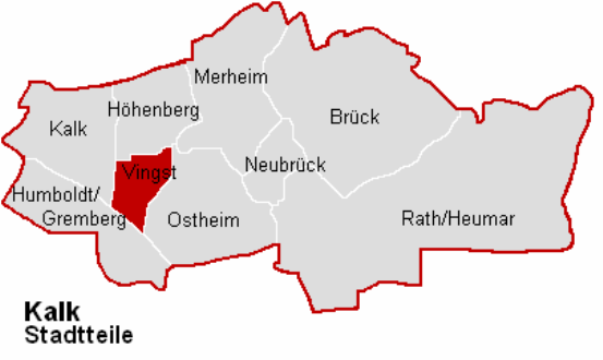 Lagekarte Vingst im Stadtbezirk Köln-Kalk